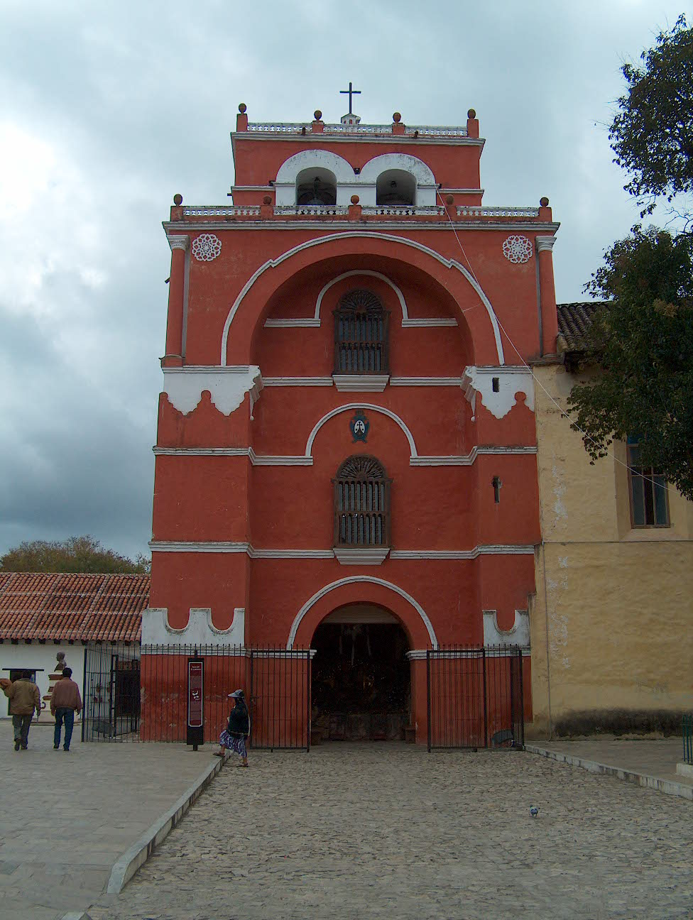 I took this photo. Arco del carmen anexo a la iglesia del Carmen.